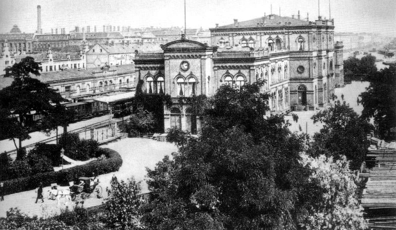 Das Empfangsgebäude des Eilenburger Bahnhofs, 1905